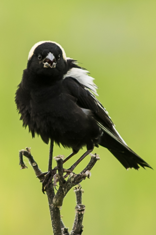 Burnidge FP Elgin, IL